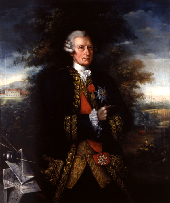 Retrato del político y militar de orígen irlandés Ricardo Wall (1694-1777), que fue teniente general del ejército español y Secretario de Estado y de Guerra durante el reinado de Carlos III de España. El retratado aparece de pie y vistiendo uniforme grande de teniente general del ejército español, que en esa época era común para el Ejército y la Armada. Y además luce la venera de la Orden de Santiago, de la que era caballero, y la cruz y la banda de la Orden de San Jenaro.